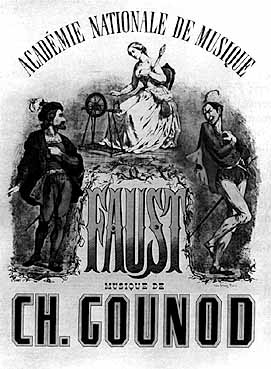 афиша гранд опера